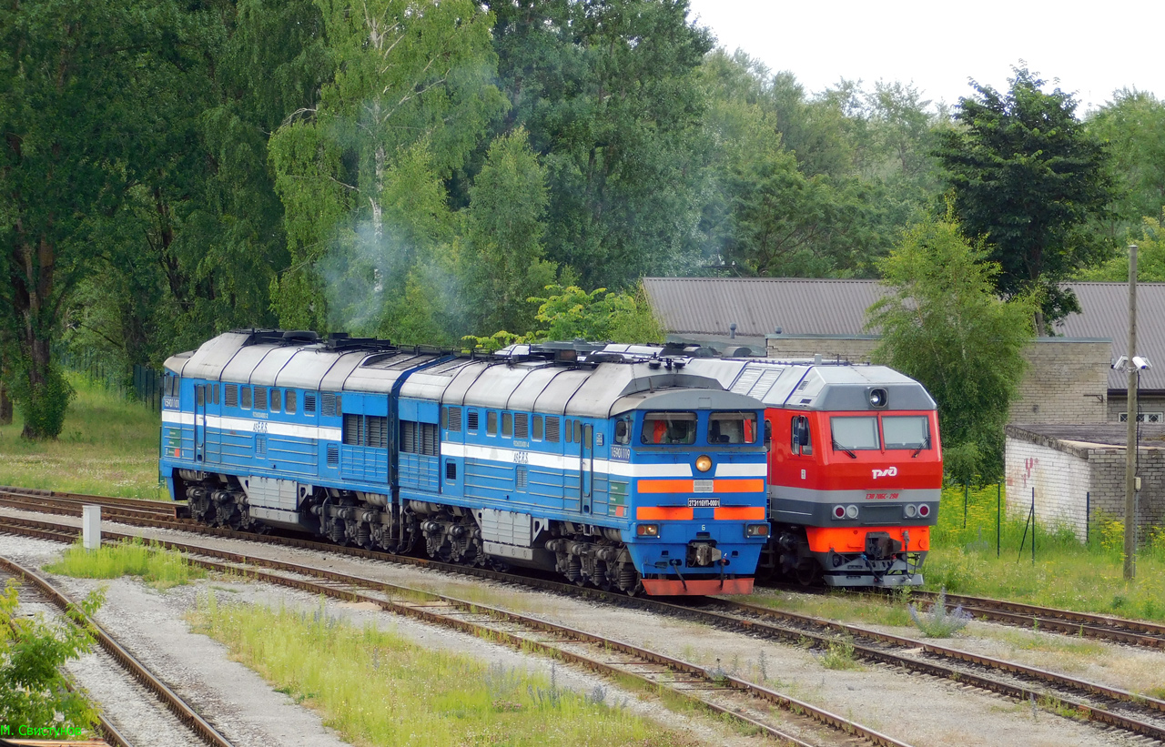 В 2001 куплен фирмой "ЛинкОйл". 19.03.2005 г. — авария под Вягева (Эстония), повреждена секция 0001А, 05.2005 восстановлена в депо Таллин-Вяйке. Был в аренде у Эстонской ж. д, проодан ОВЭ "Ямалтрансстрой" (Северная ж. д.), 07.04.2009 секция 0001А пострадала от возгорания. 05.2009 г. прибыл на ремонт на Воронежский ТРЗ, 10.2011 г. прибыл на ремонт на Даугавпилсский ЛРЗ. После ремонта ДЛРЗ продан частной компании А. S. "Estonian Railway Services" 16838708/16838716 КР Даугавпилсский ЛРЗ 03.2012 г.